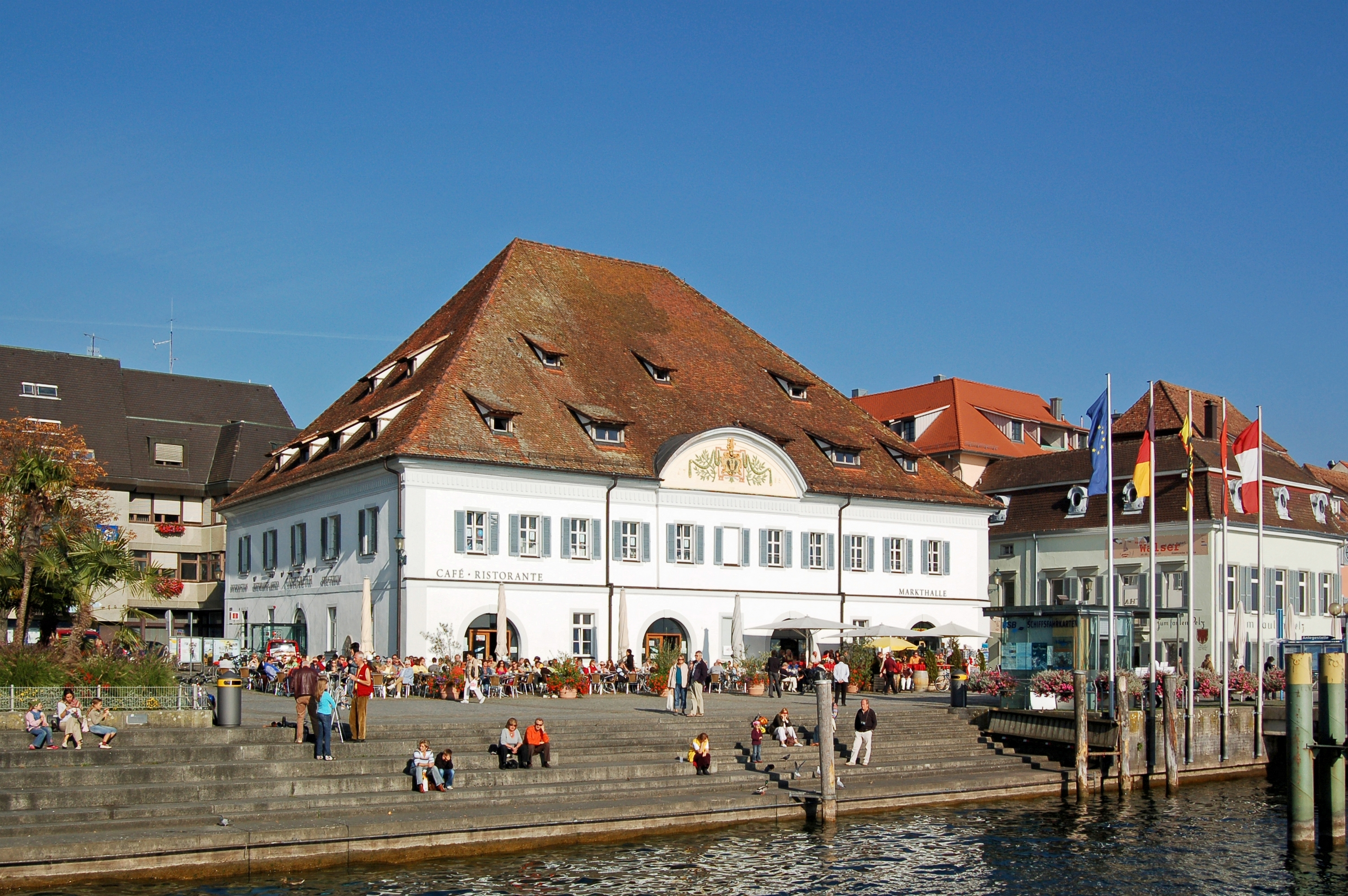 Teil des Überlinger Landungsplatzes vom Schiff aus gesehen. Im Bild die sog. »Greth«, ein 1788 erbautes Handels- und Kornhaus am Landungsplatz direkt am See. 1998 wurde es komplett saniert und beherbergt heute eine Markthalle, Touristen-Info, Kino und Restaurants.